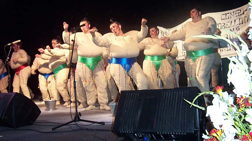 Comparsa Perucas, durante el Carnaval de Alcalá la Real (Jaén, España)